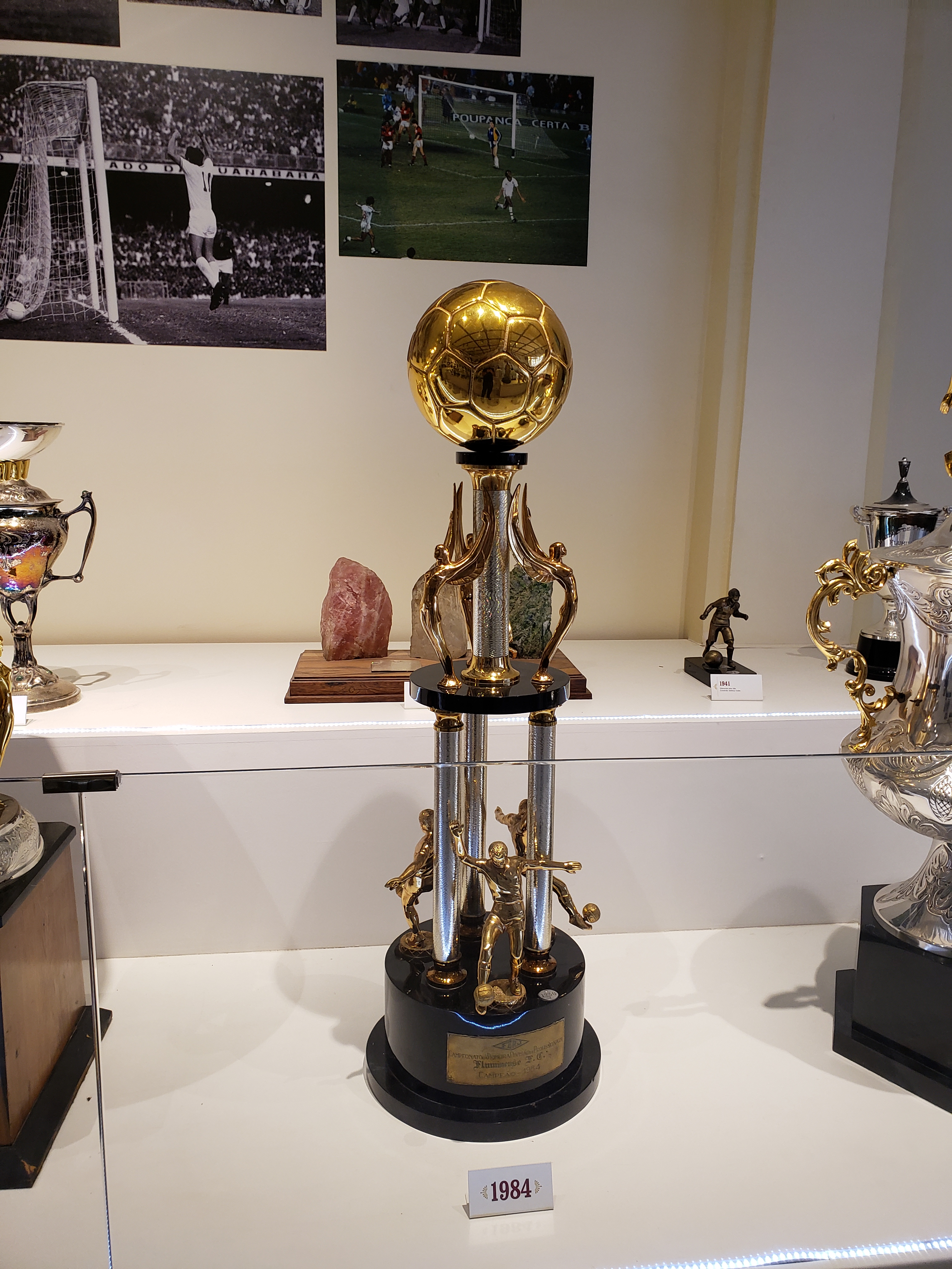 Taça do Campeonato Carioca de Futebol de 1984, conquistado pelo Fluminense Football Club em um Fla-Flu.